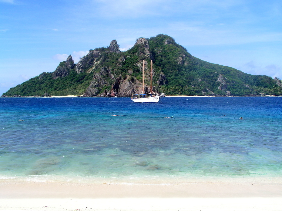 Monu Island, Mamanuca group, Fiji